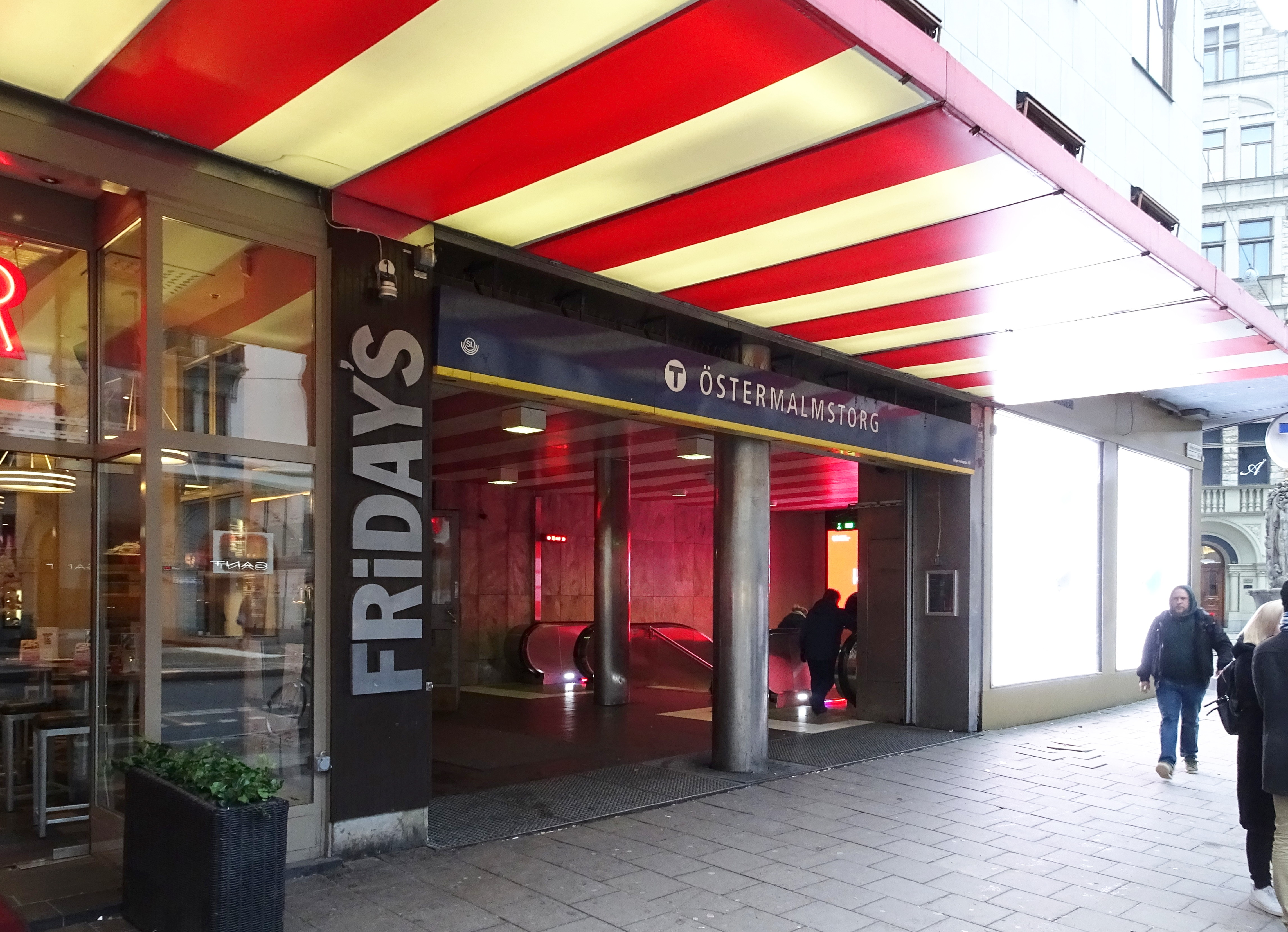 Birger Jarlsgatan 16A, Grev Turegatan 1, Nybyggnadsår 1935, Gustaf Clason (Arkitekt). Städernas Allmänna Brandstodsbolag (Byggherre). Zetterberg AB (Byggmästare). F.d. entré till biografen Spegeln